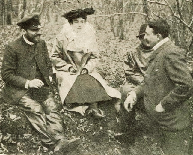 Léon Serpollet, Mme, et Henri Fournier, au kilomètre de Dourdan en 1902 - La Vie au Grand Air du 22 novembre 1902, p.789